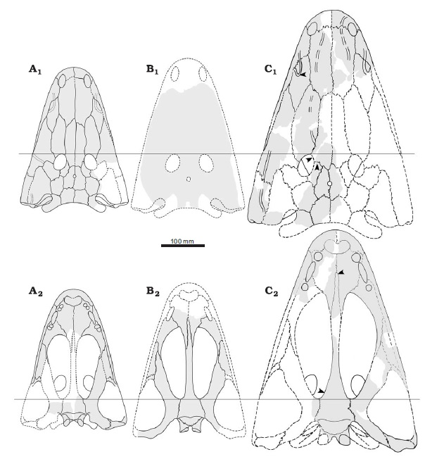 Partial ontogenetic sequence representing sub−adult to adult stages in the temnospondyl Xenotosuchus africanus (Haughton, 1925) from the Middle Triassic (Cynognathus Assemblage Zone, Beaufort Group) of the Karoo Basin, South Africa. A. UCMP 41286 in dorsal (A1) and ventral (A2) views. B. SAM−PK−3008 in dorsal (B1) and ventral (B2) views. C. CGP/1/135 in dorsal (C1) and ventral (C2) views; arrows indicate ontogenetically variable characters of the cranium of X. africanus, as discussed in the text. Grey shading represents the preserved portions of each skull.